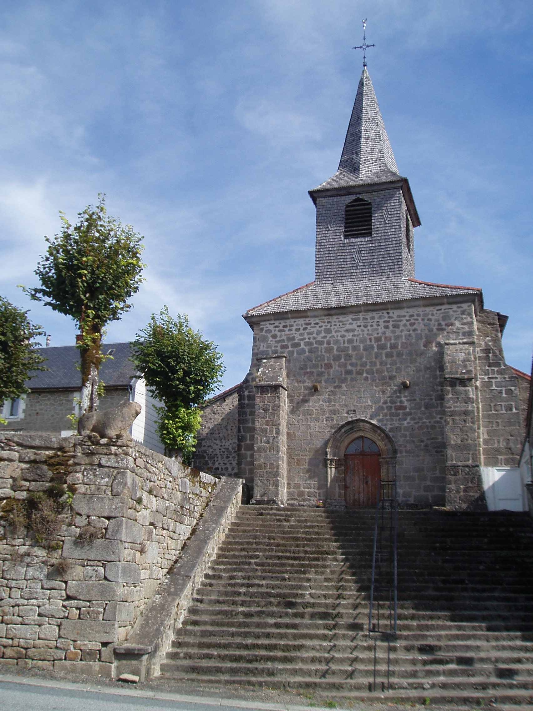 Eglise St Georges